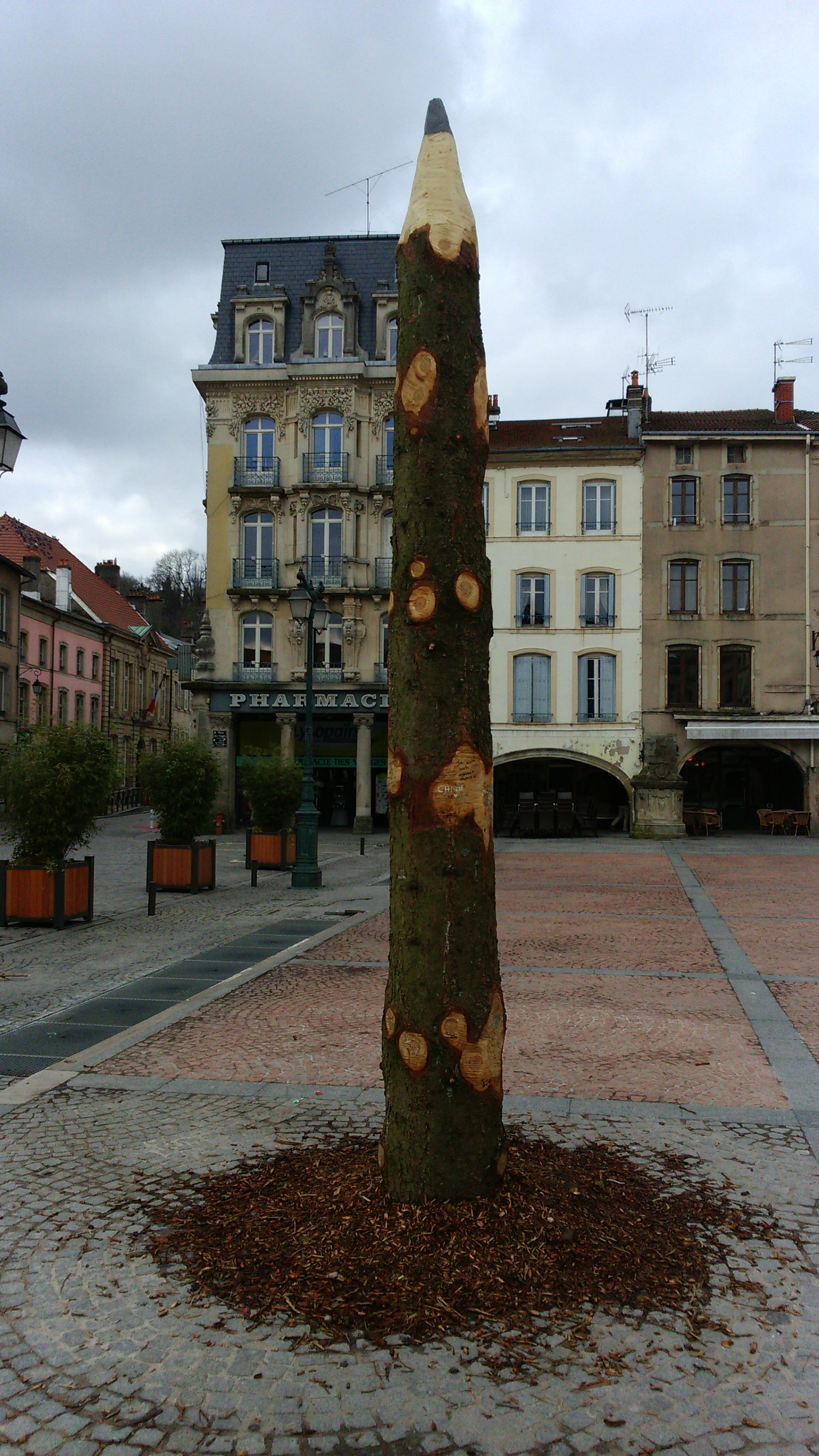 Tronc du sapin de Noël de la place des Vosges à Épinal transformé en crayon en hommage aux victimes de l'attentat contre Charlie Hebdo.